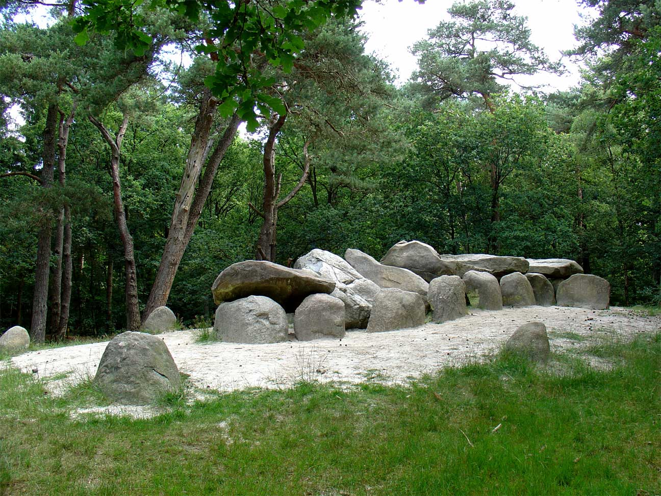 Hunebed D45 in de Emmerdennen bij Emmen